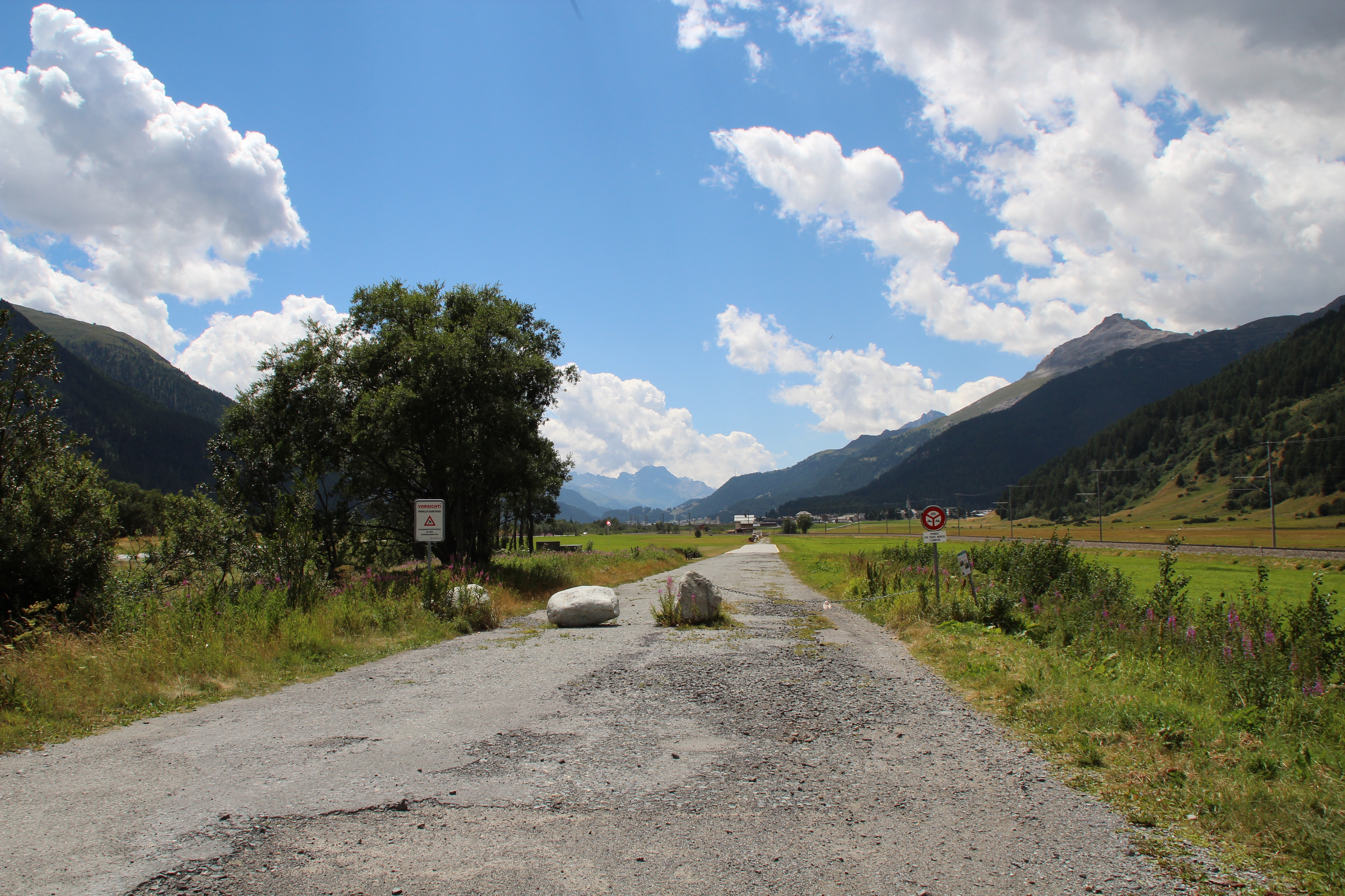 Las Agnas bei Bever, nach Westen